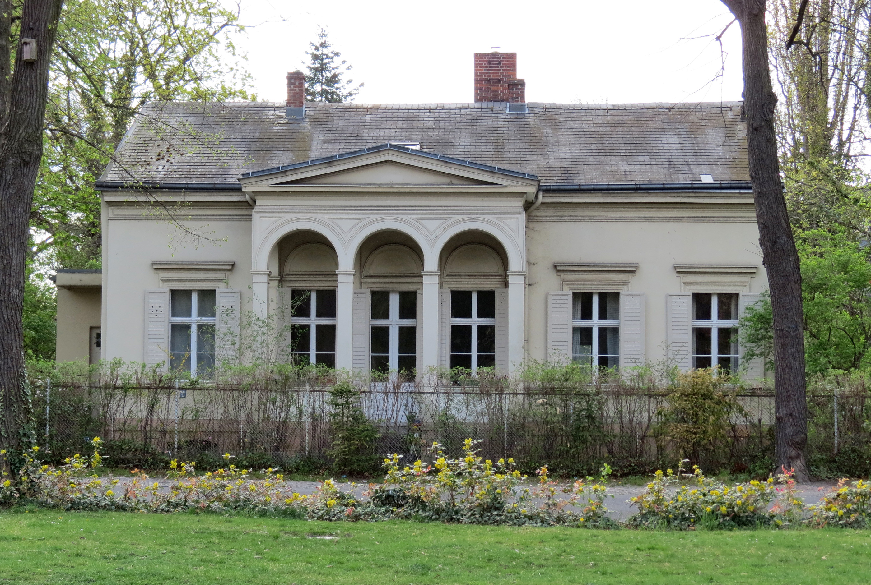 Lindenallee 7, Berlin-Westend